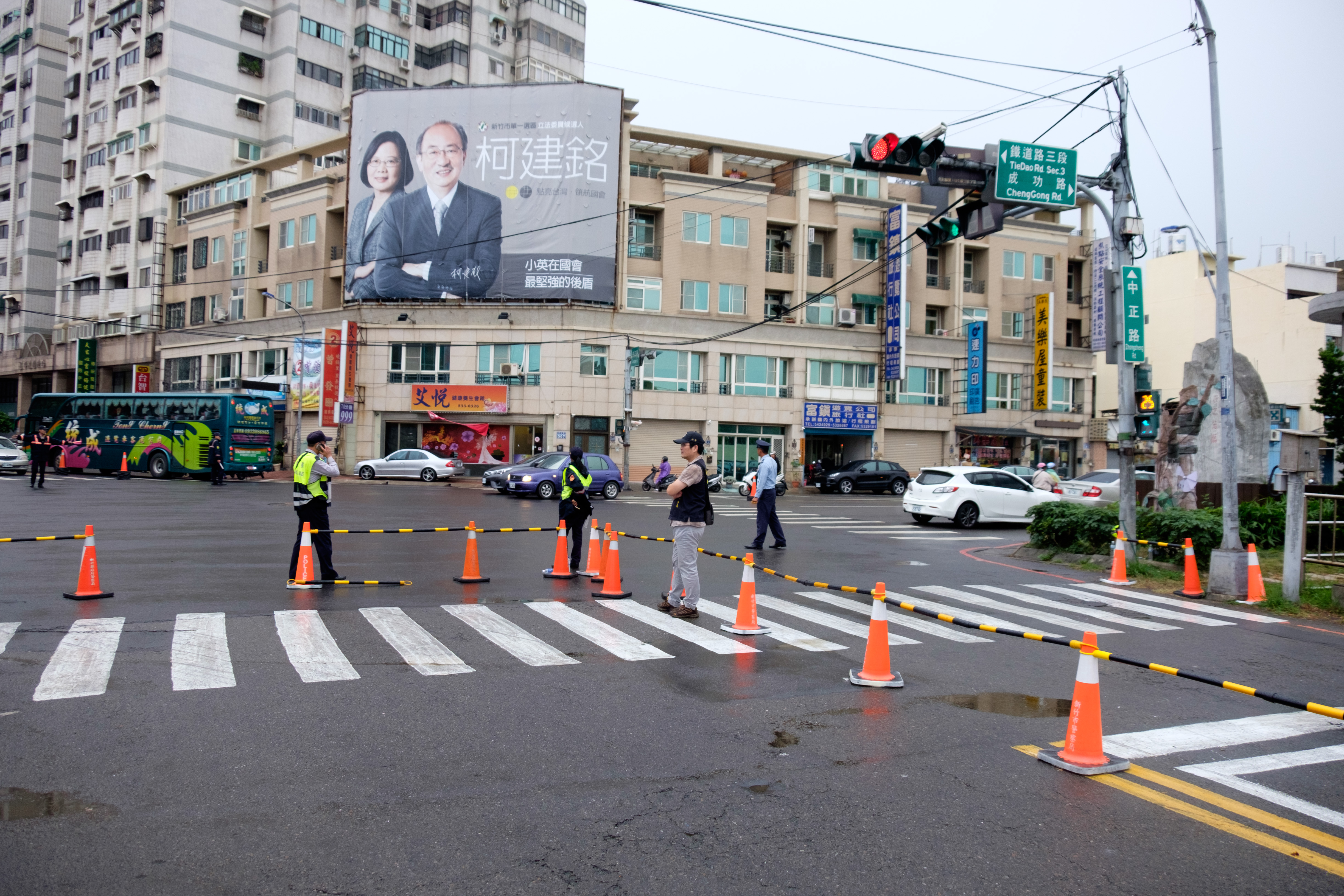 2015年空軍新竹基地營區開放活動，實施交通管制中的新竹市北區中正路與鐵道路三段、成功路路口。